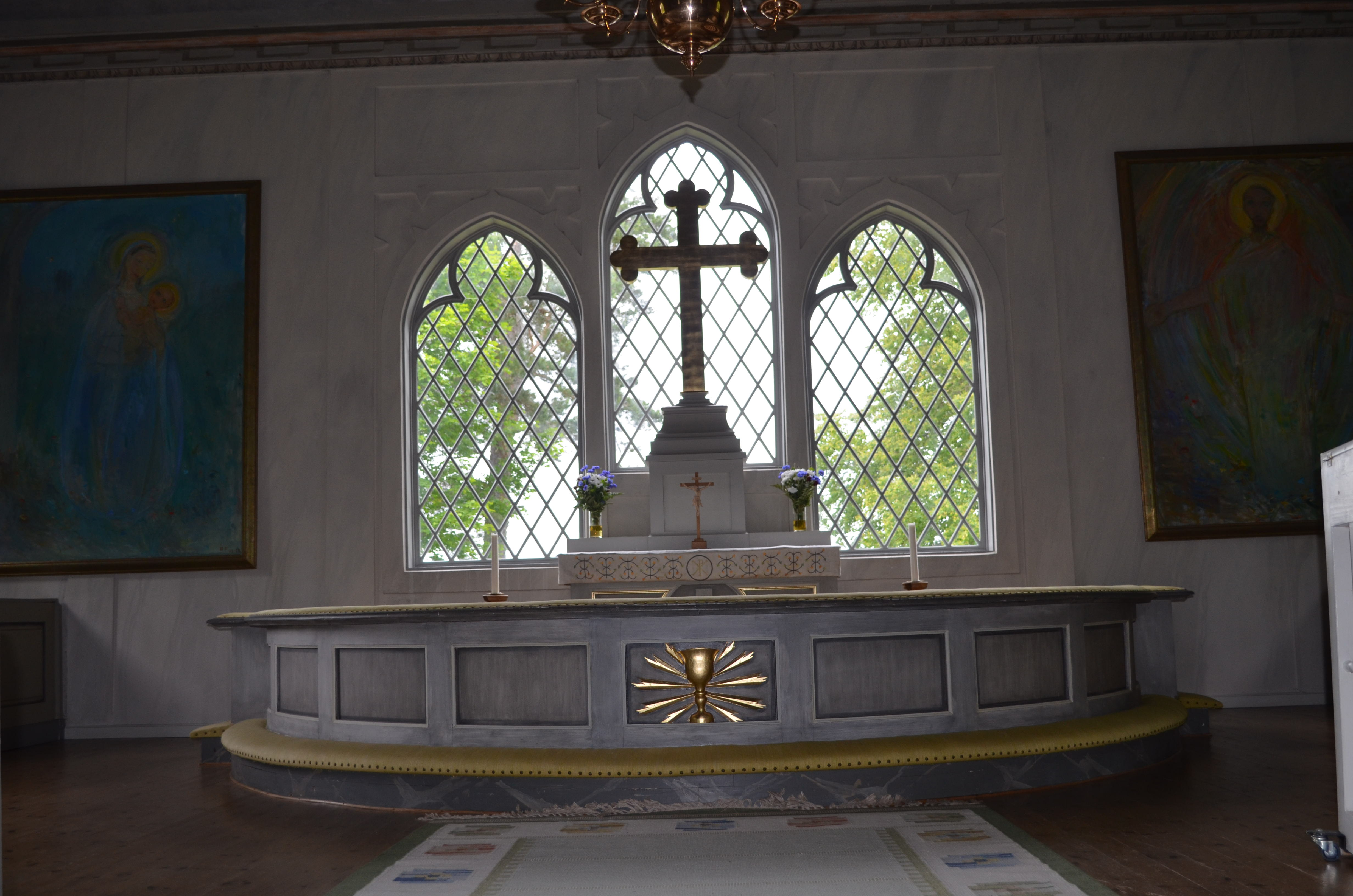 Altaret